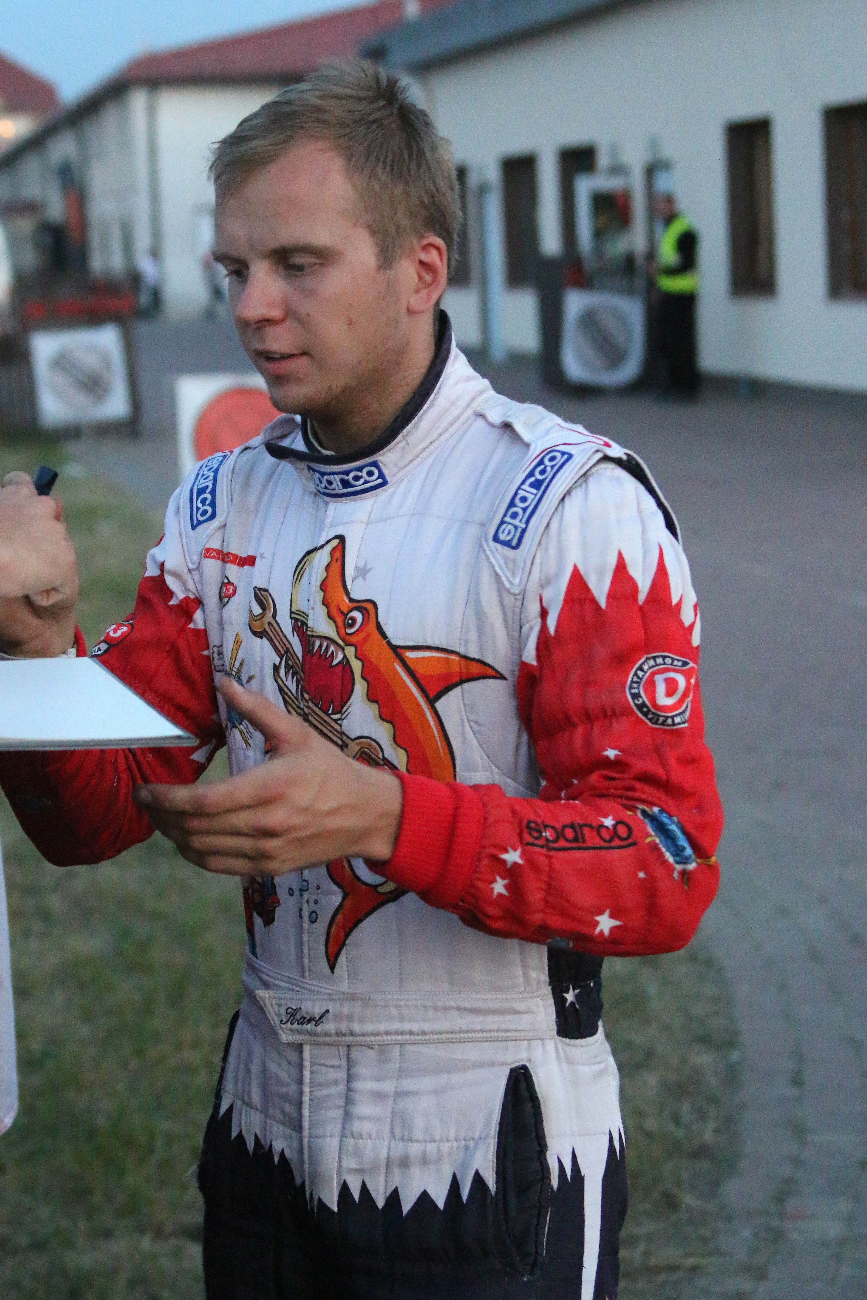 Karl Kruuda